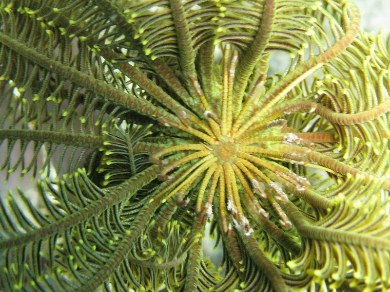 Comatella sp en isla Lizard. Obsérvense los abundantes y fuertes cirri.